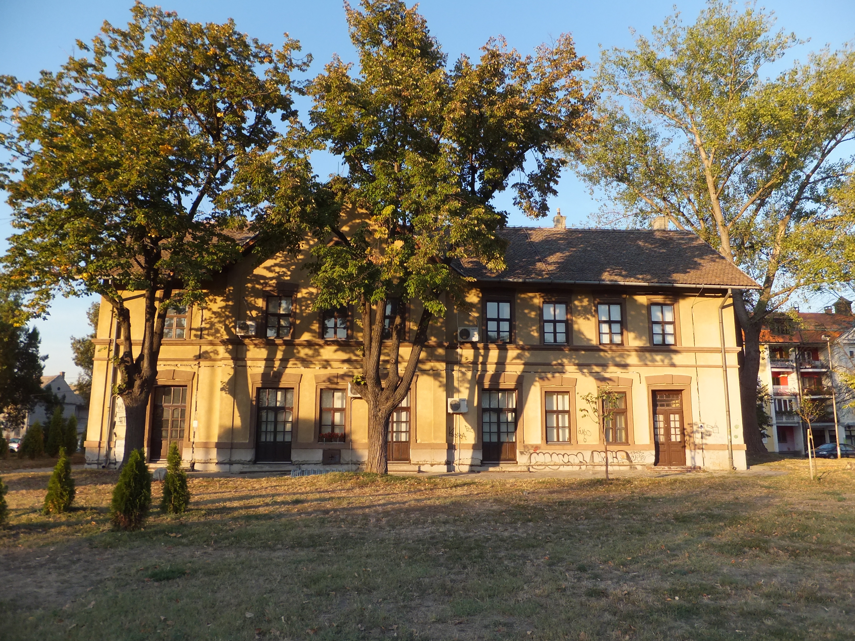 Железничка станица Тамиш